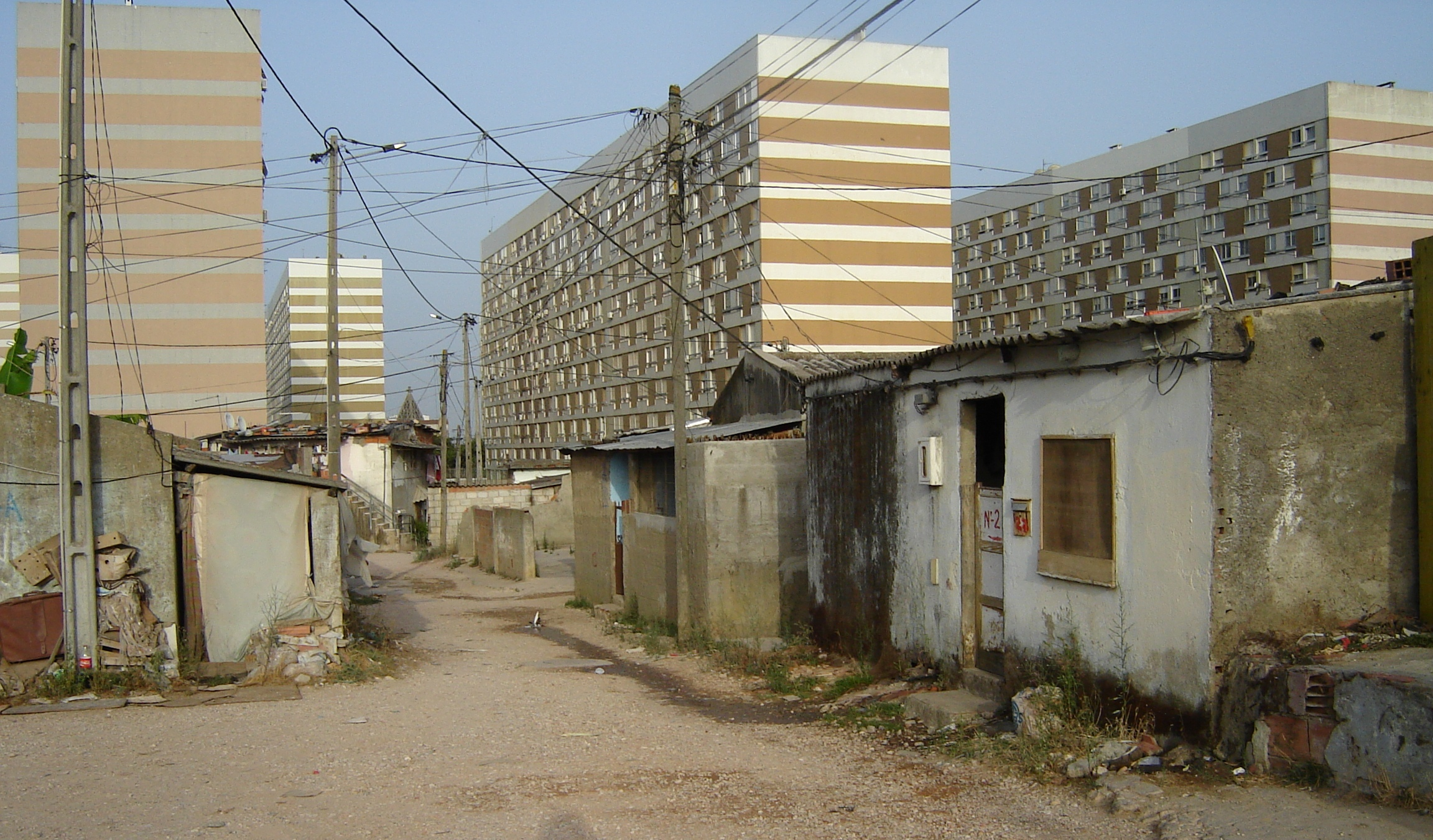 Quinta da Vitória no concelho de Loures, com a Portela ao fundo